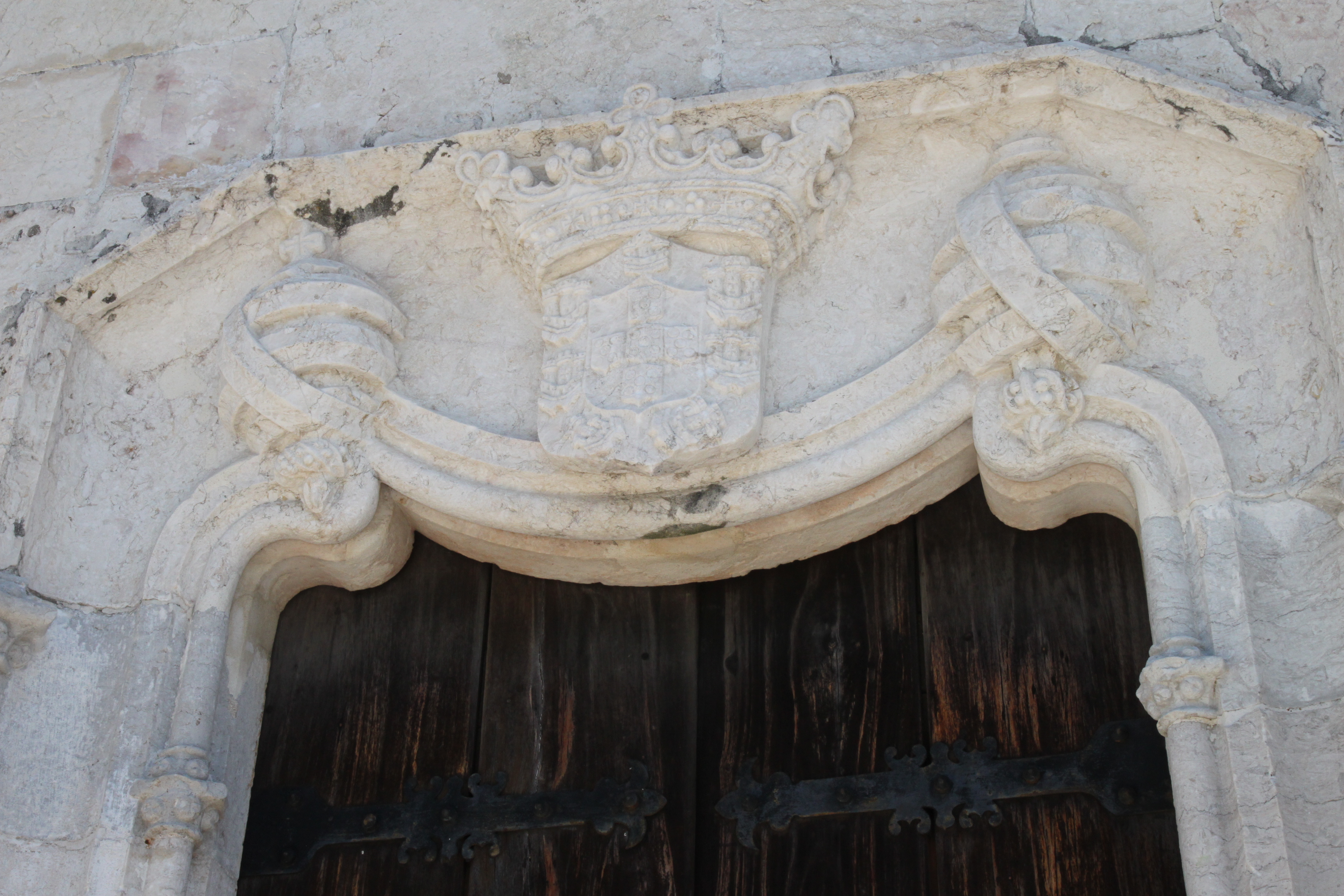 Capela de São Jerónimo ou Ermida de São Jerónimo ou Ermida do Restelo This file was uploaded for Wiki Loves Monuments in Portugal with the unique identifier 70633.